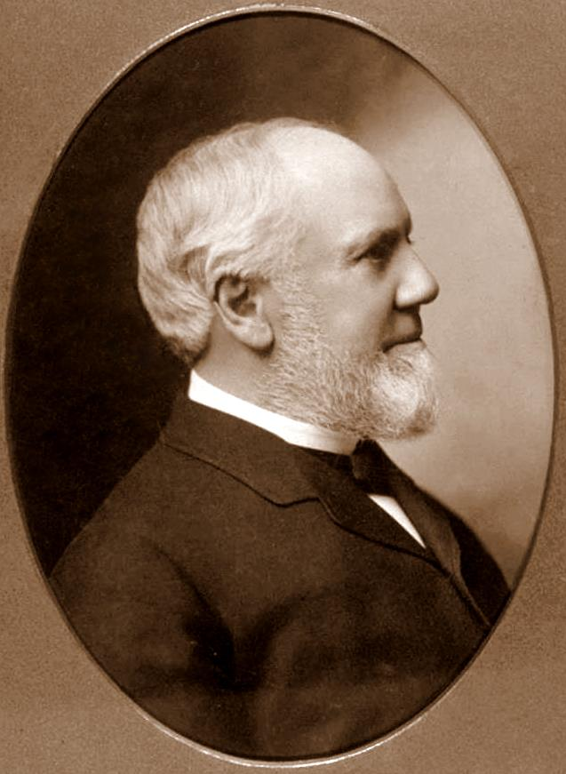 Lloyd Tevis